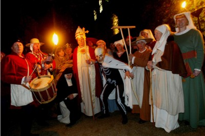 Das Hansevolk führt 2008 den Totentanz zur Museumsnacht in Lübeck auf.